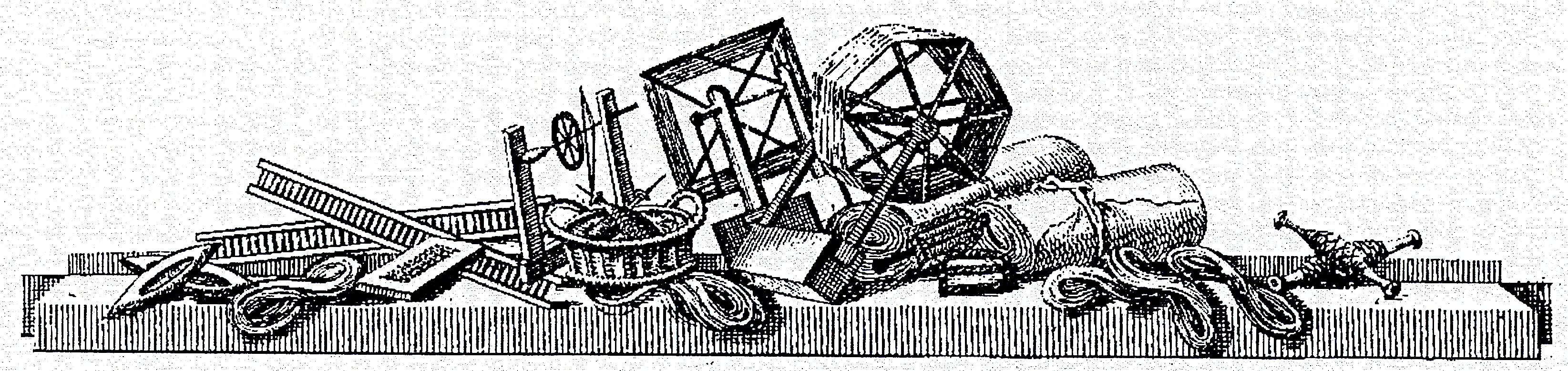 Neues Bild- und Muster-Buch zur Beförderung der edlen Leinen- und Bild-Weberkunst : in 74. Kupfertafeln mit Erklärungen erläutert/Kirschbaum, Johann Michael. - [4. Auflage]. - Heilbronn und Rothenburg ob der Tauber : Claß, 1827